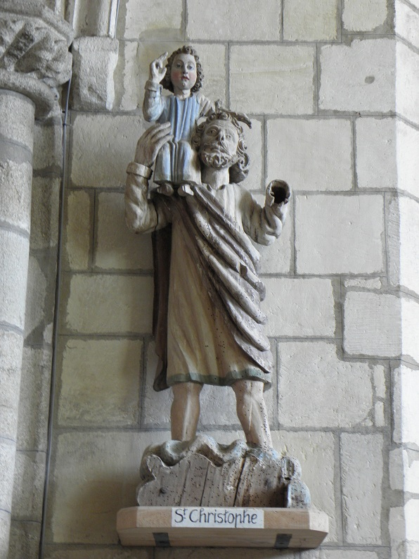 Statue de Saint-Christophe en la cathédrale Saint-Paul-Aurélien de Saint-Pol-de-Léon (29).